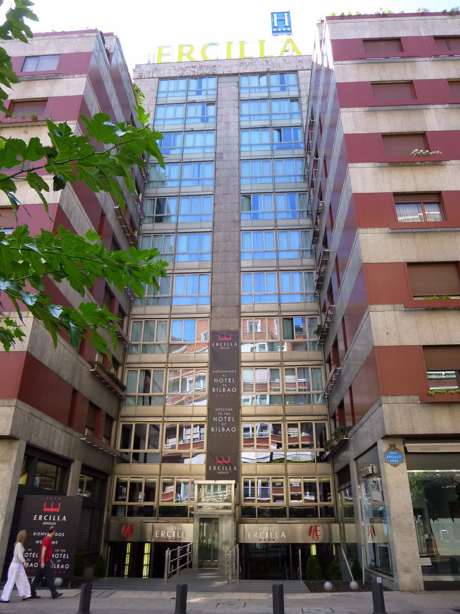 Hotel Ercilla (Bilbao).